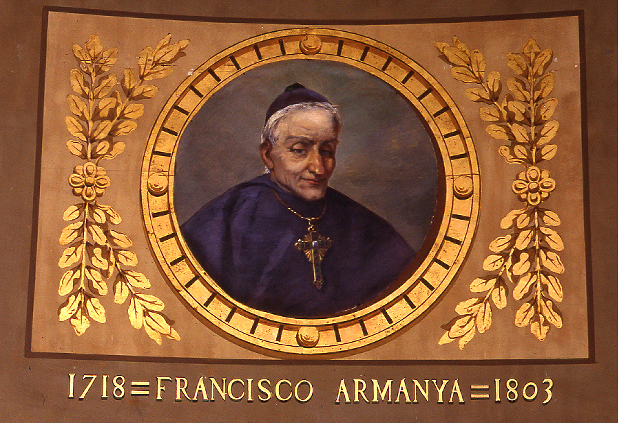 Retrat de Francesc Armanyà. pintura sobre tela. Biblioteca Museu Víctor Balaguer